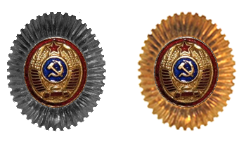 Кокарды 1960